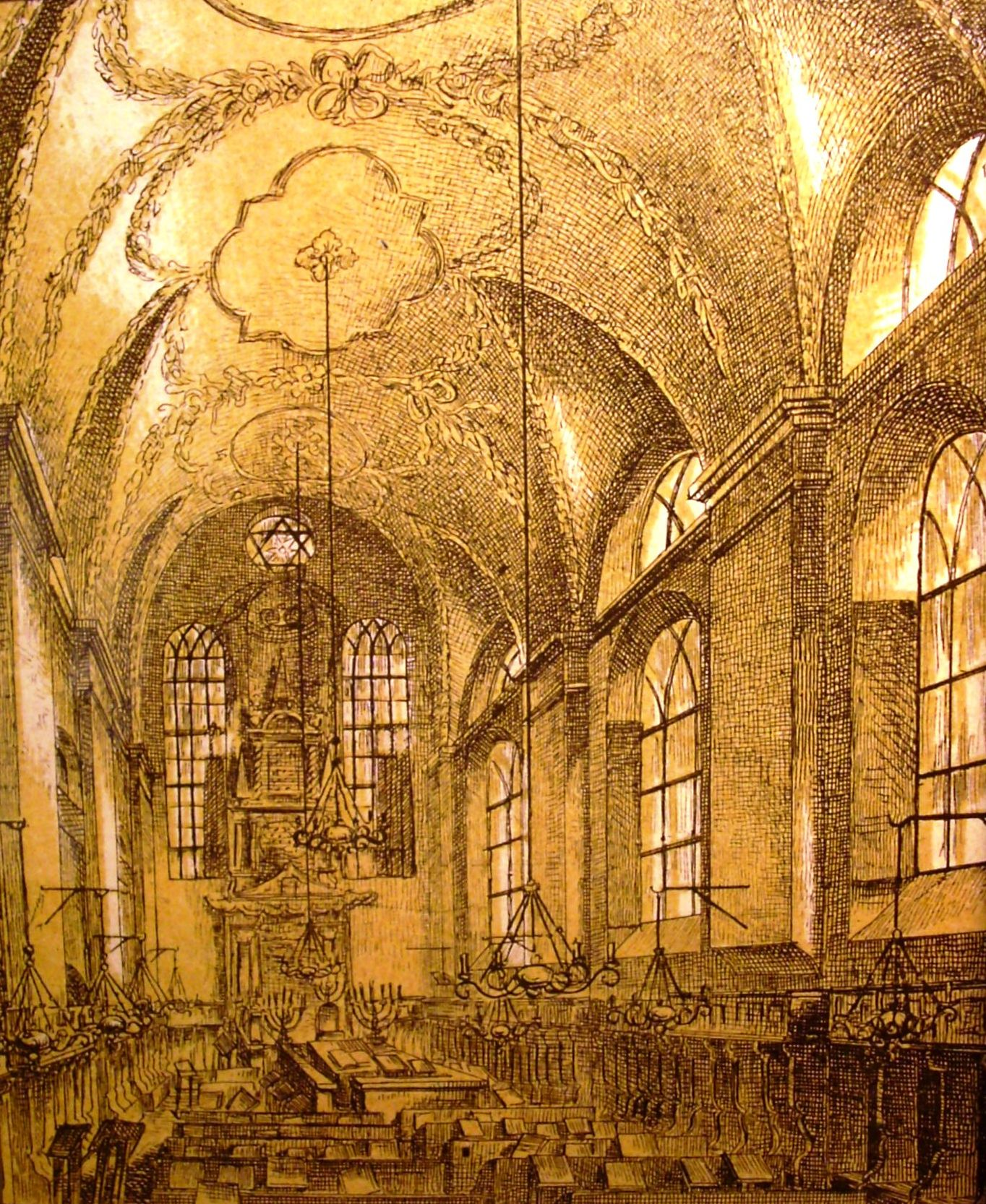 Klausová synagoga v Praze